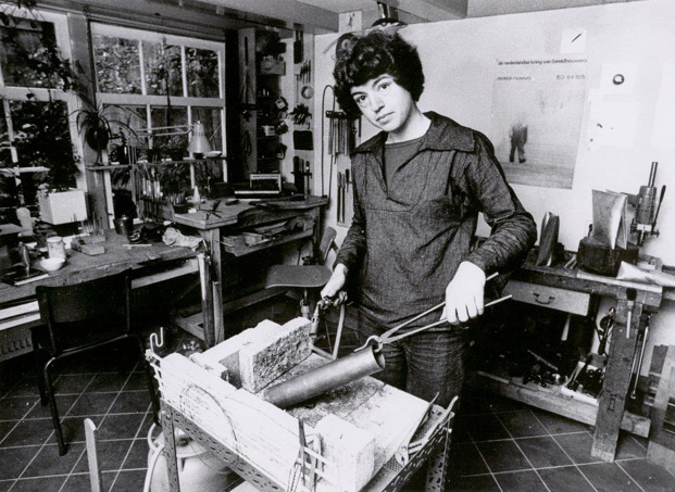 Portret van Françoise van den Bosch, beeldend kunstenares